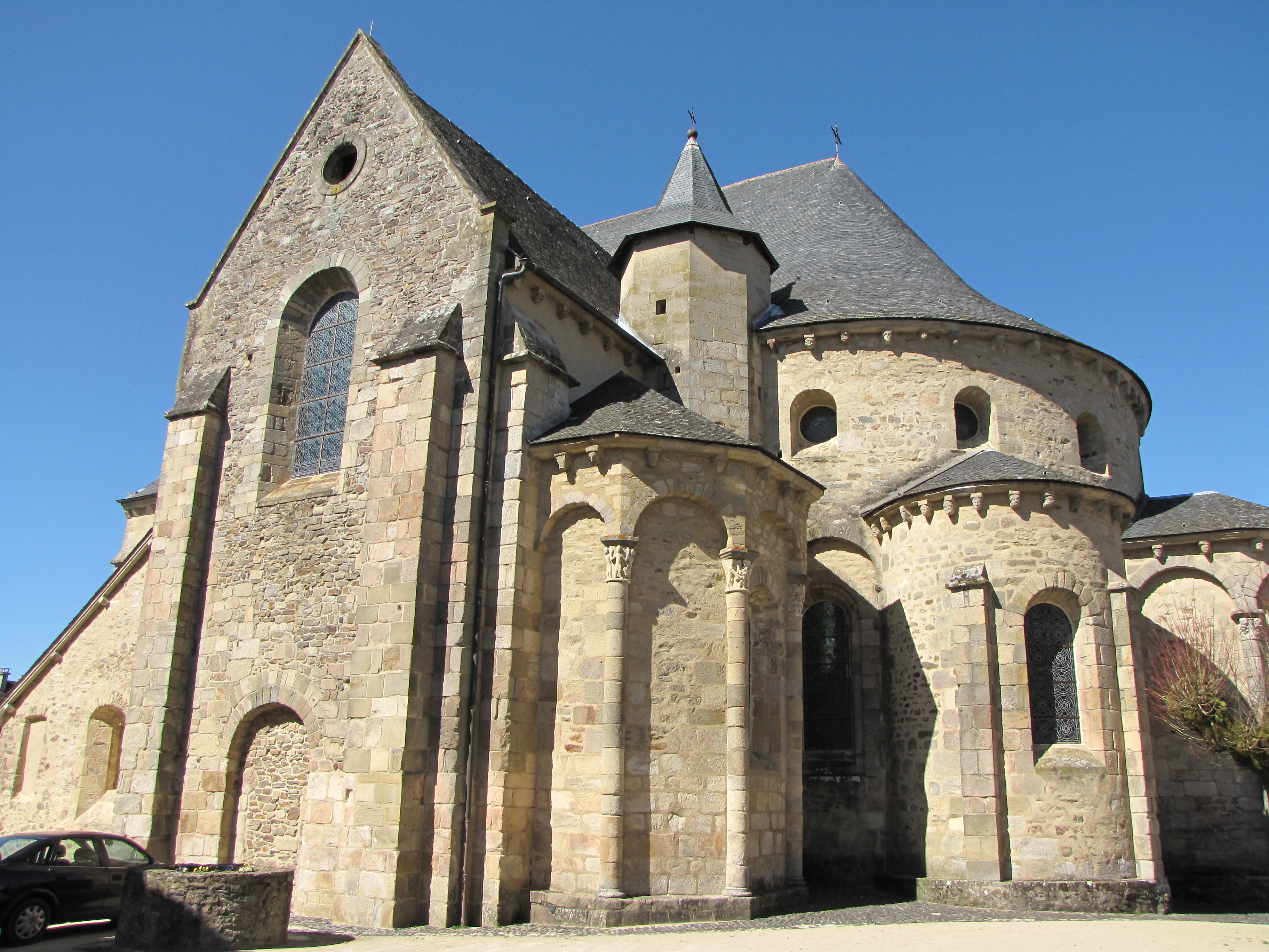 L'église abbatiale Saint-Pierre de Vigeois, Corrèze, France